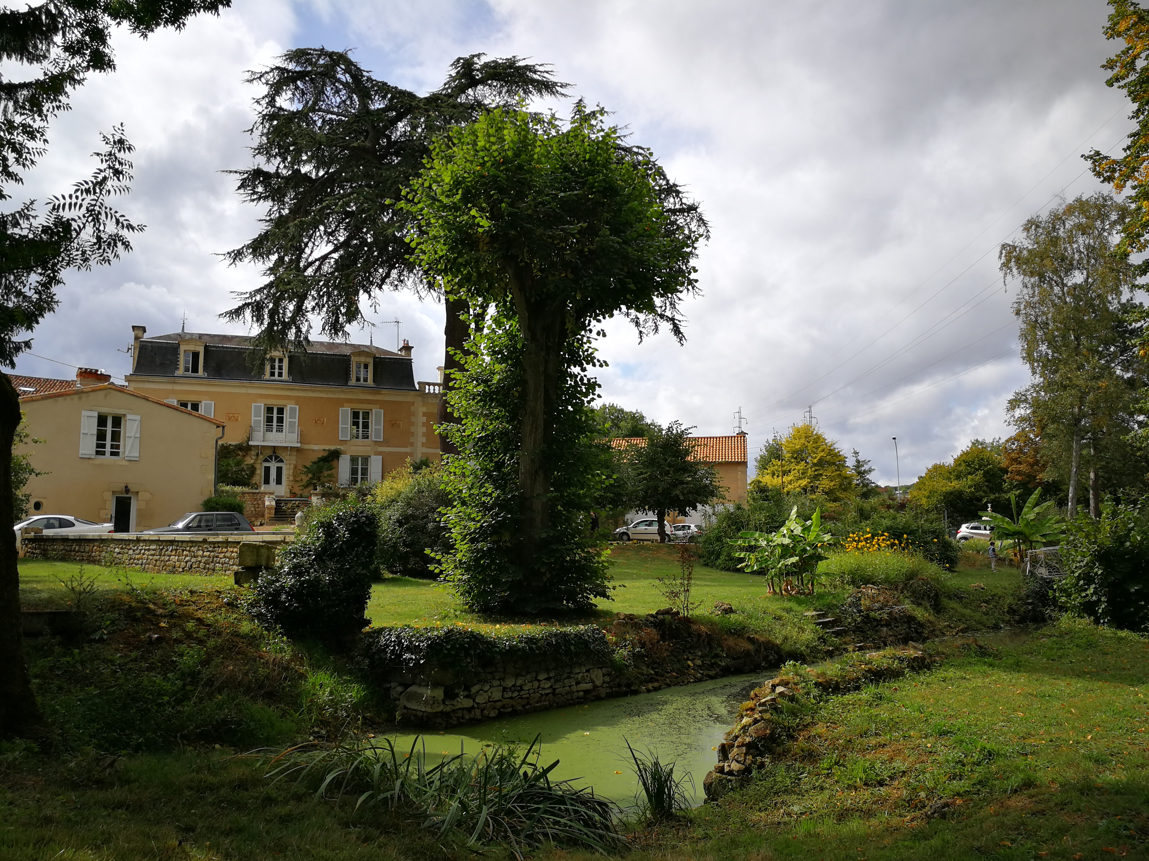 Photo prise lors de l’ouverture au public dans le cadre des Journées européennes du Patrimoine, le 17/09/2017